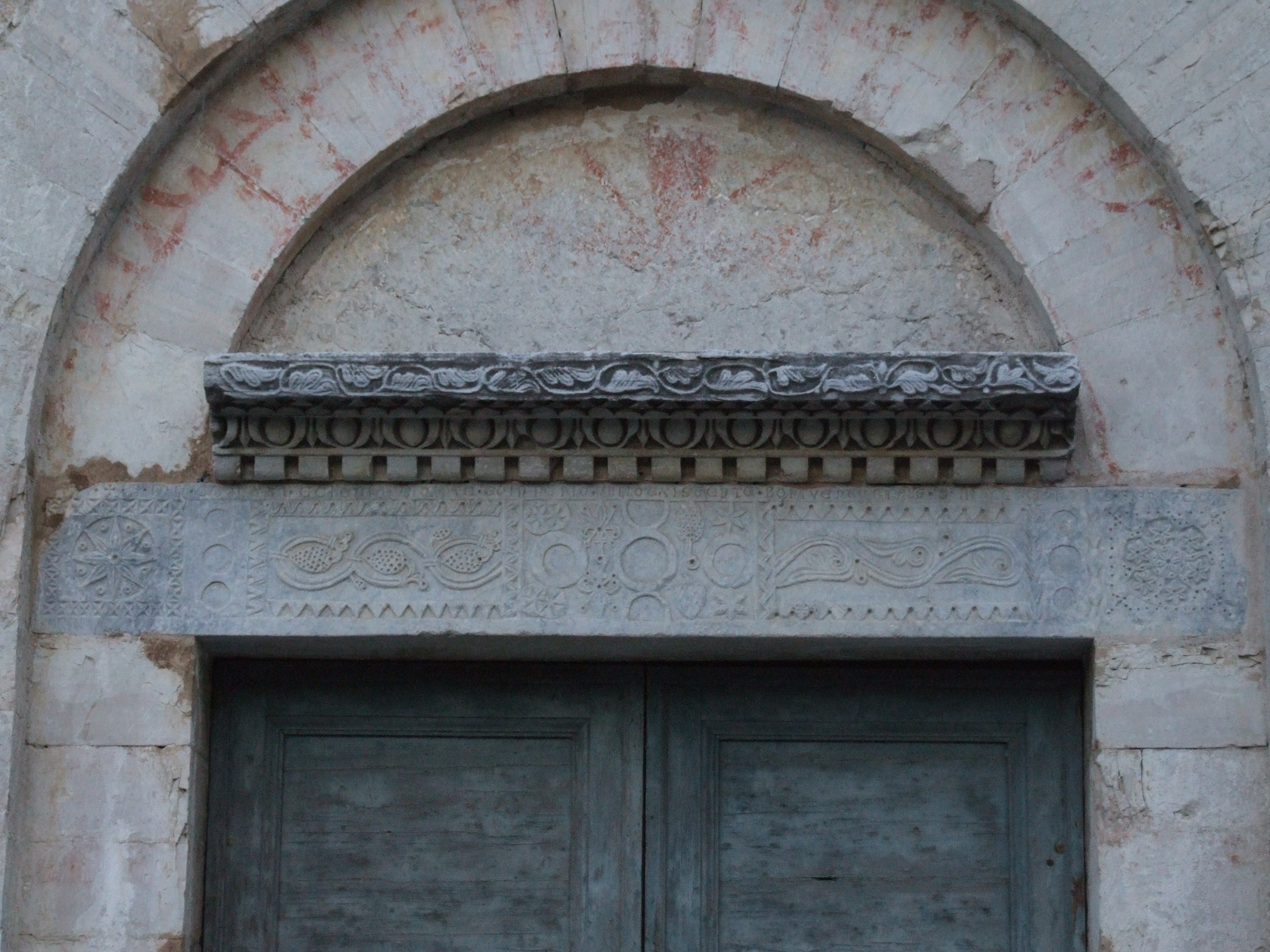 Abbazia di San Vincenzo - portale This is a photo of a monument which is part of cultural heritage of Italy.